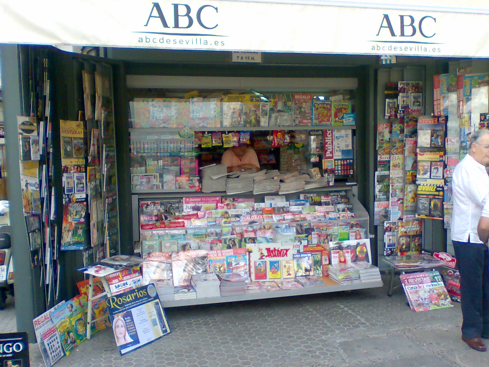 Kiosco de prensa en el Barrio de los Remedios, Sevilla.